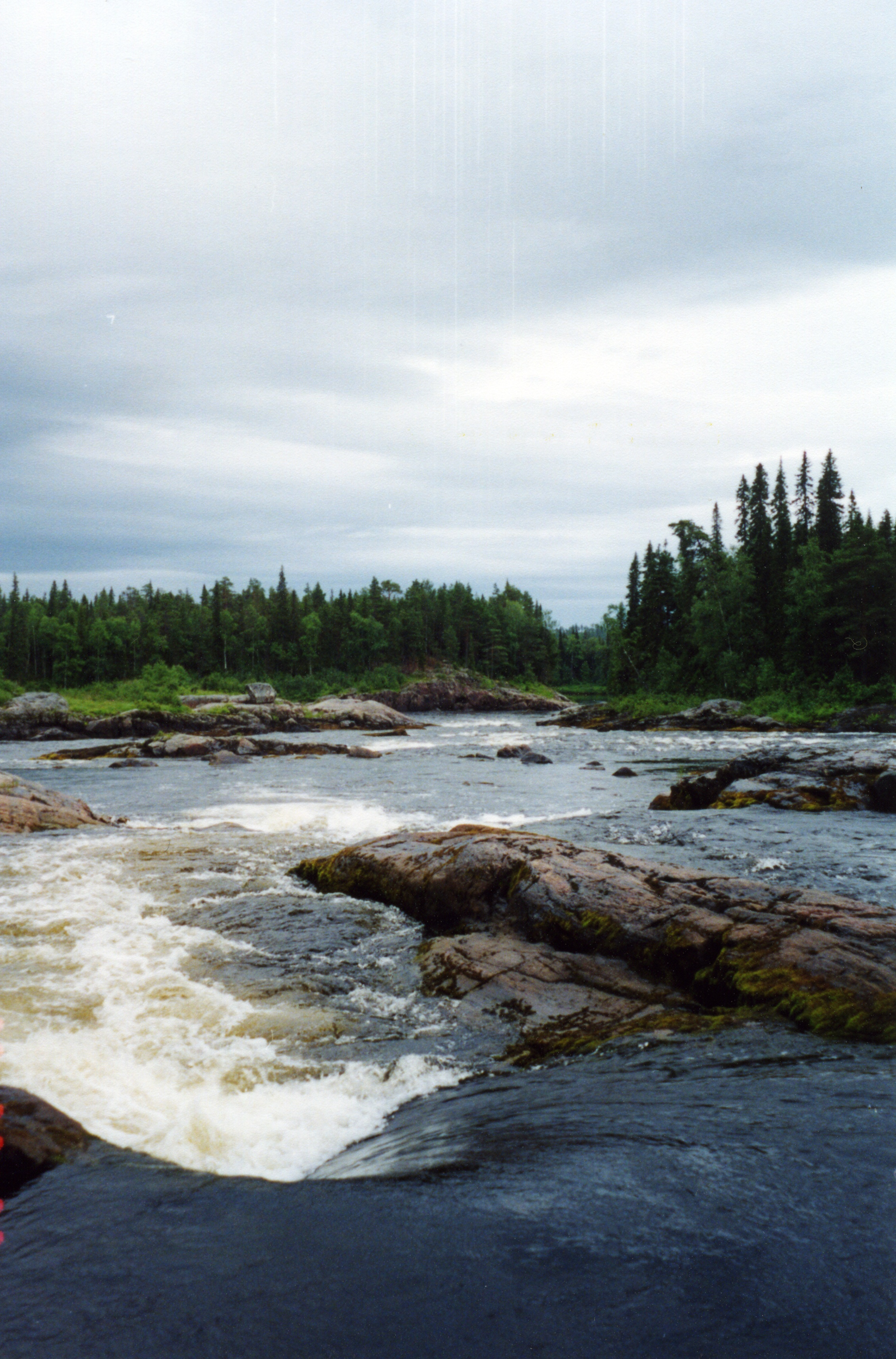 Тумча